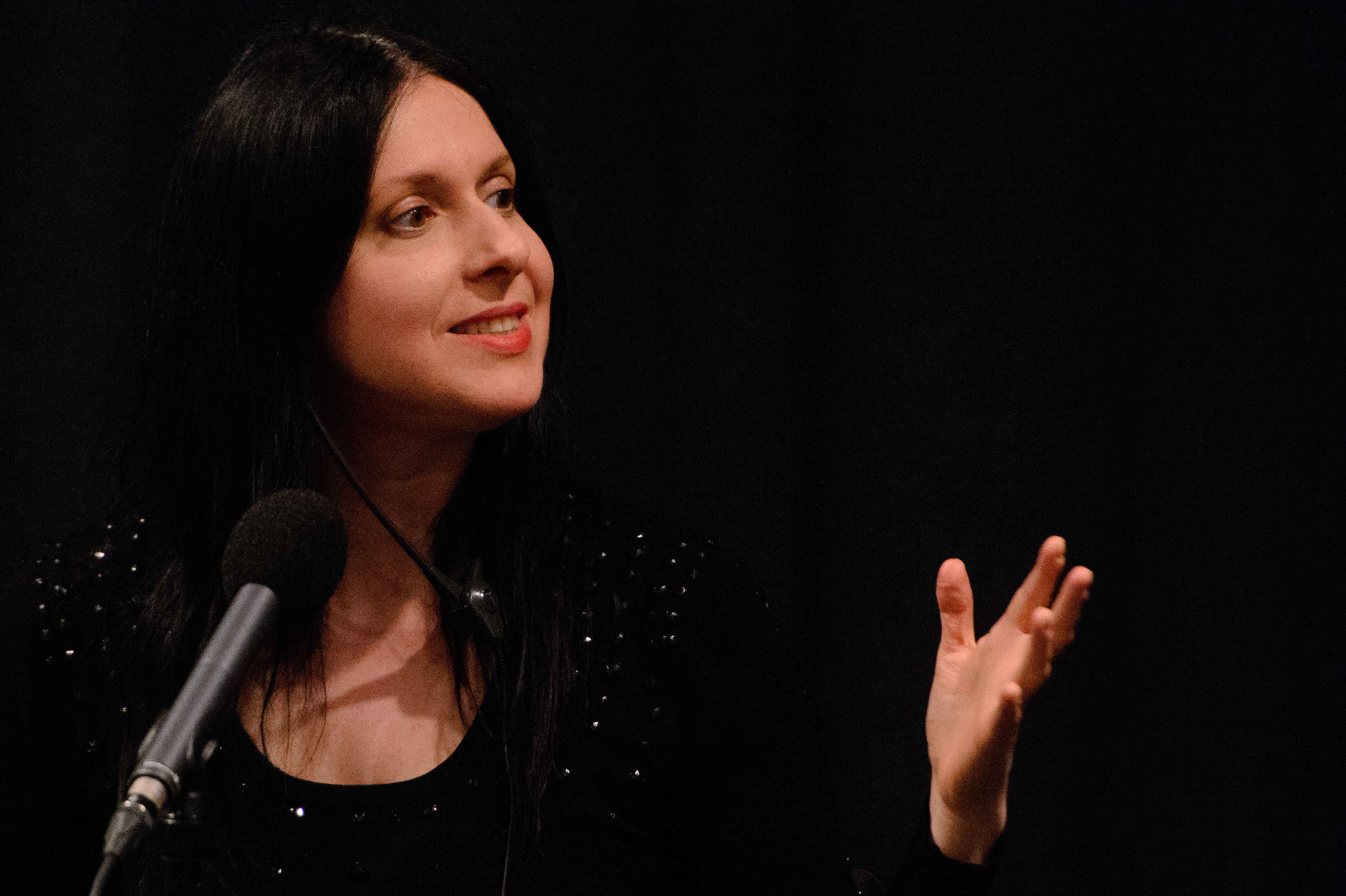 Sarah Blau (Schriftstellerin, Israel), Foto